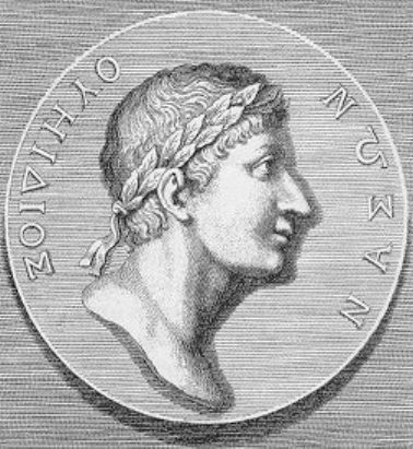 Публій Овідій Назон